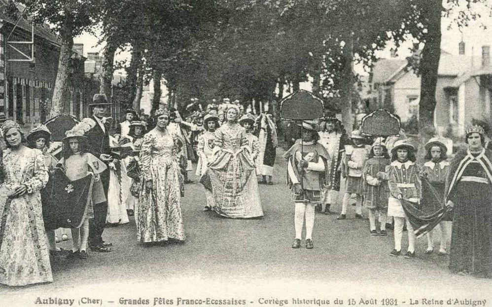 La Reine d'Aubigny aux Grandes Fêtes Franco-Écossaises d'Aubigny (Cher) le 15 août 1931. (Robert Stuart de Darnley était jadis seigneur d'Aubigny)